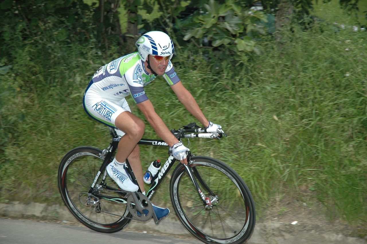 Juan Miguel Mercado